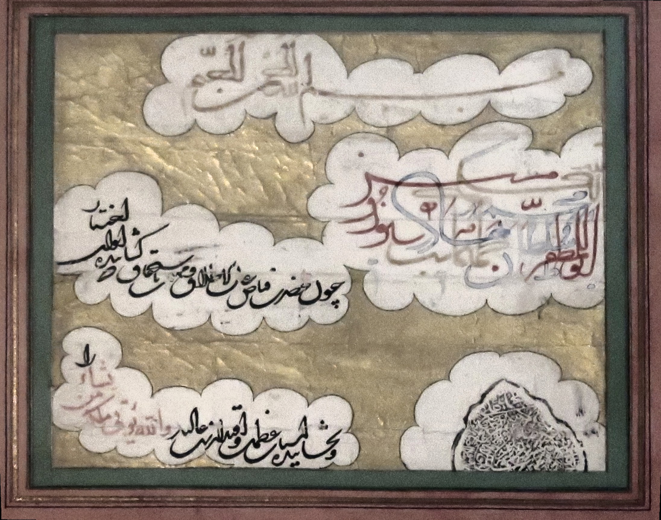 فرمان و مهر سلطان محمد خدابنده صفوی